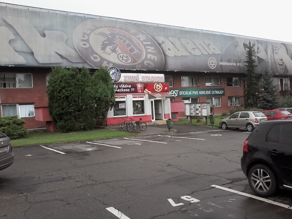 Vchod do administrativní části staré Werk aréna